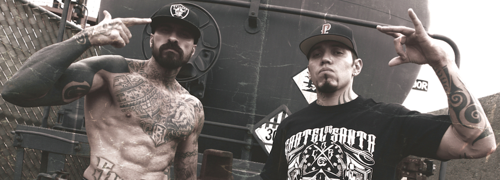 CARTEL DE SANTA 2015